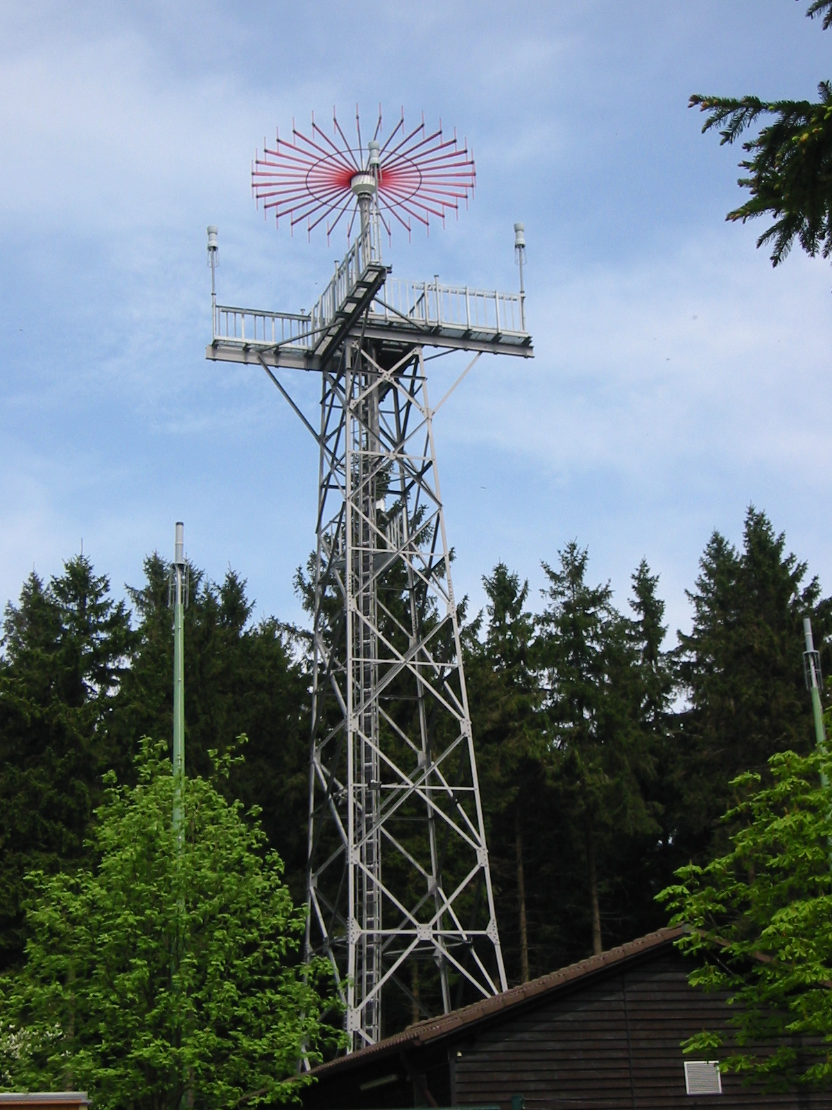 Antennenträger, UKW-Peiler (Very high frequency Diretion Finder - VDF) der DFS auf dem Deister in der Nähe von Hannover.